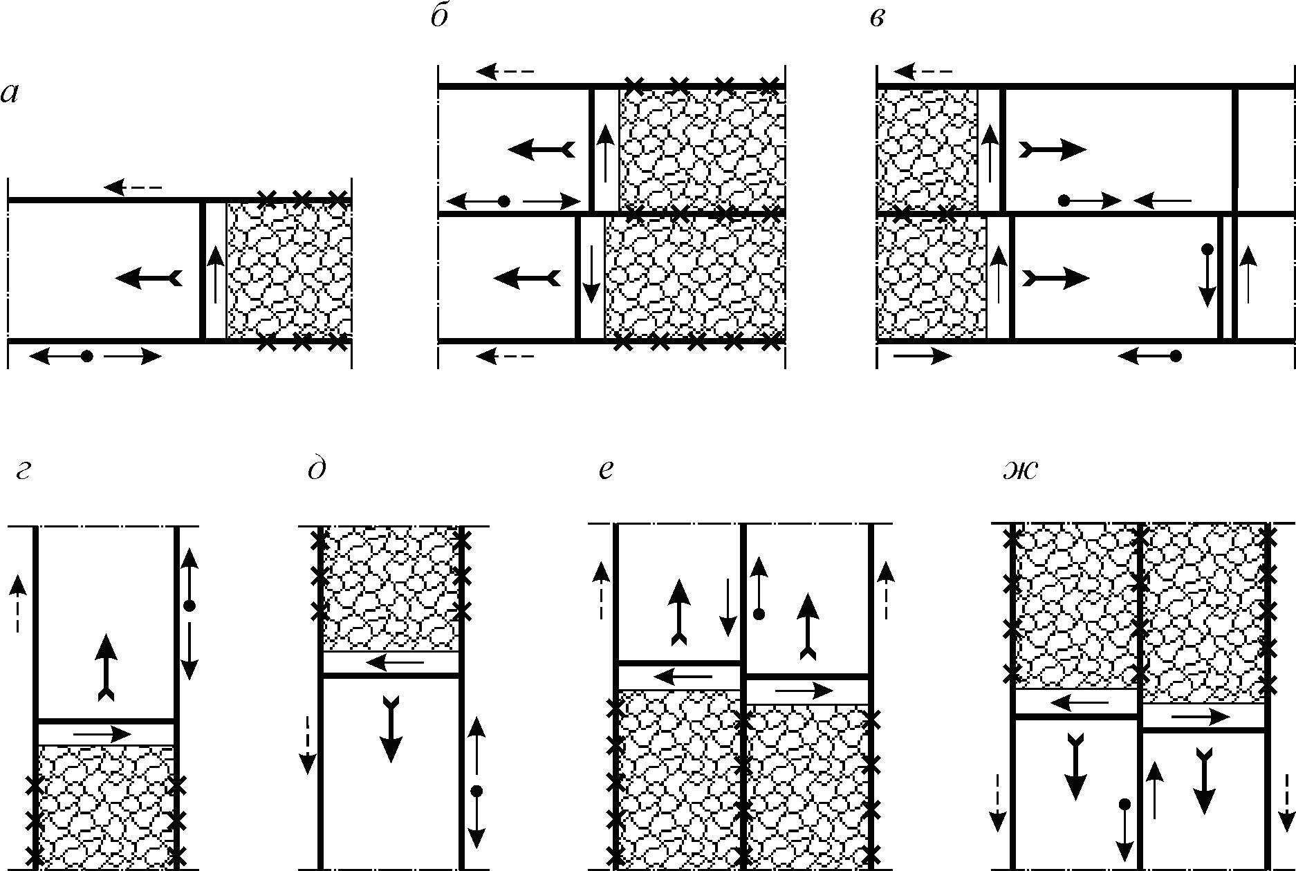 Схема